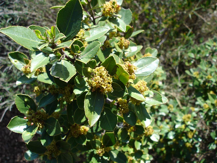 Rhamnus alaternus (nerprun alaterne)Photo prise à Corbère-les-Cabanes en mars 2005